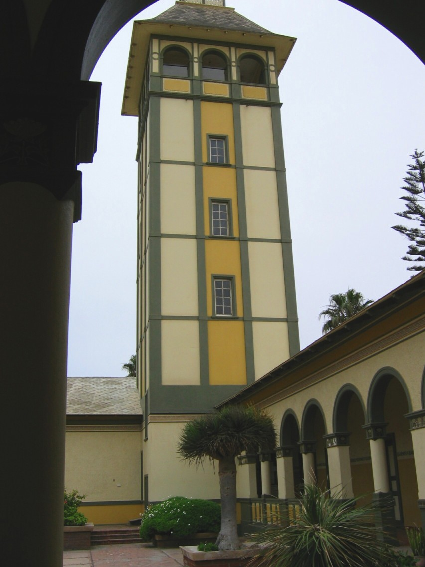 Damaraturm des Woermannhauses, Swakopmund, Namibia